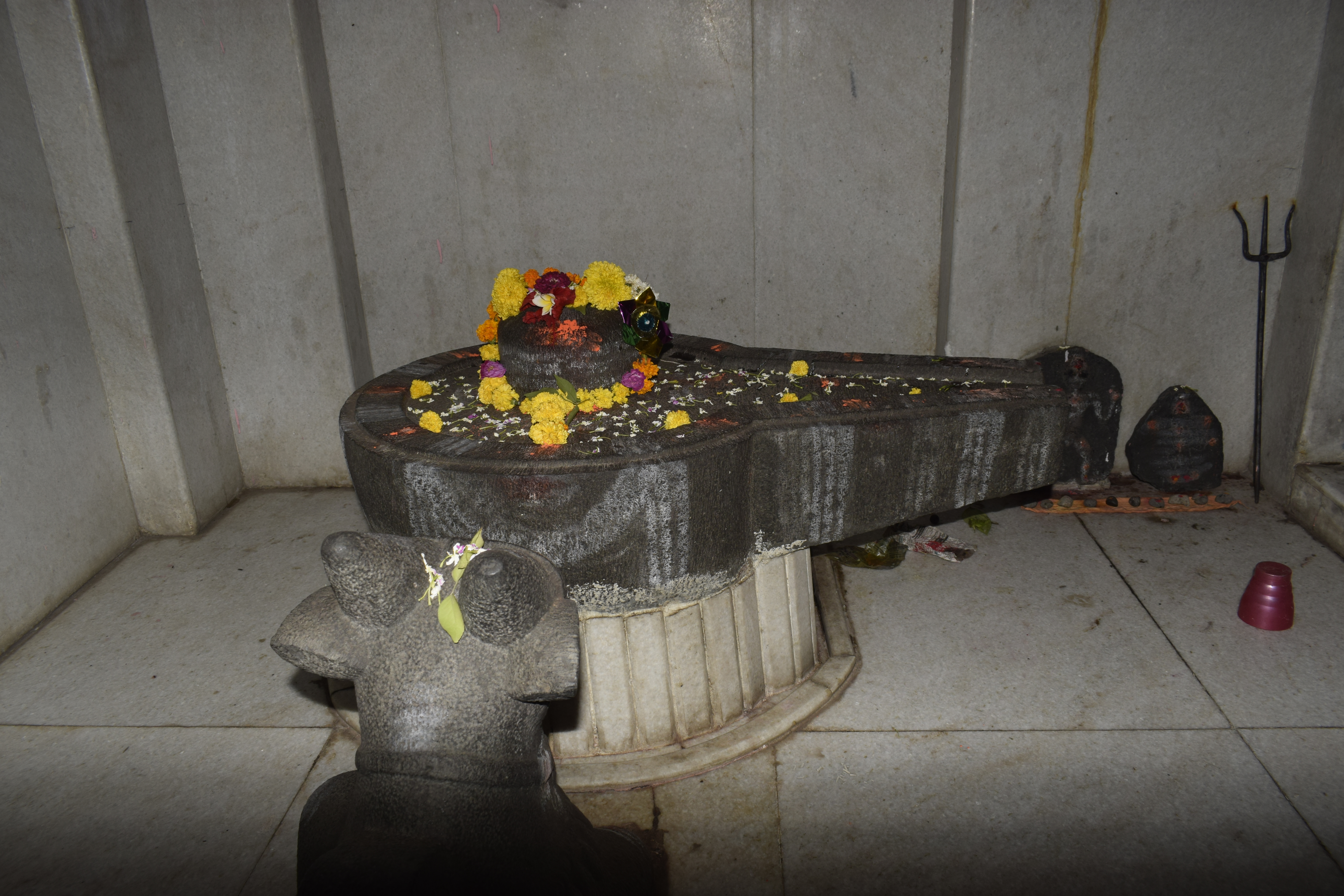 श्री यल्लेश्वर लिंग